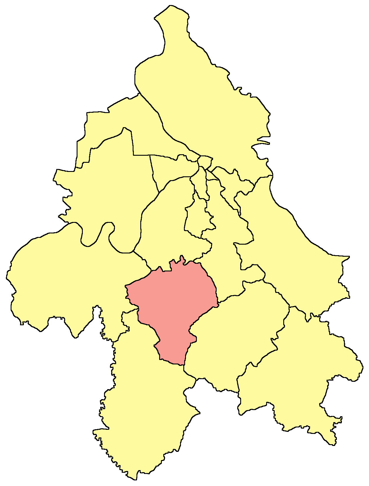 Belgrade municipality map